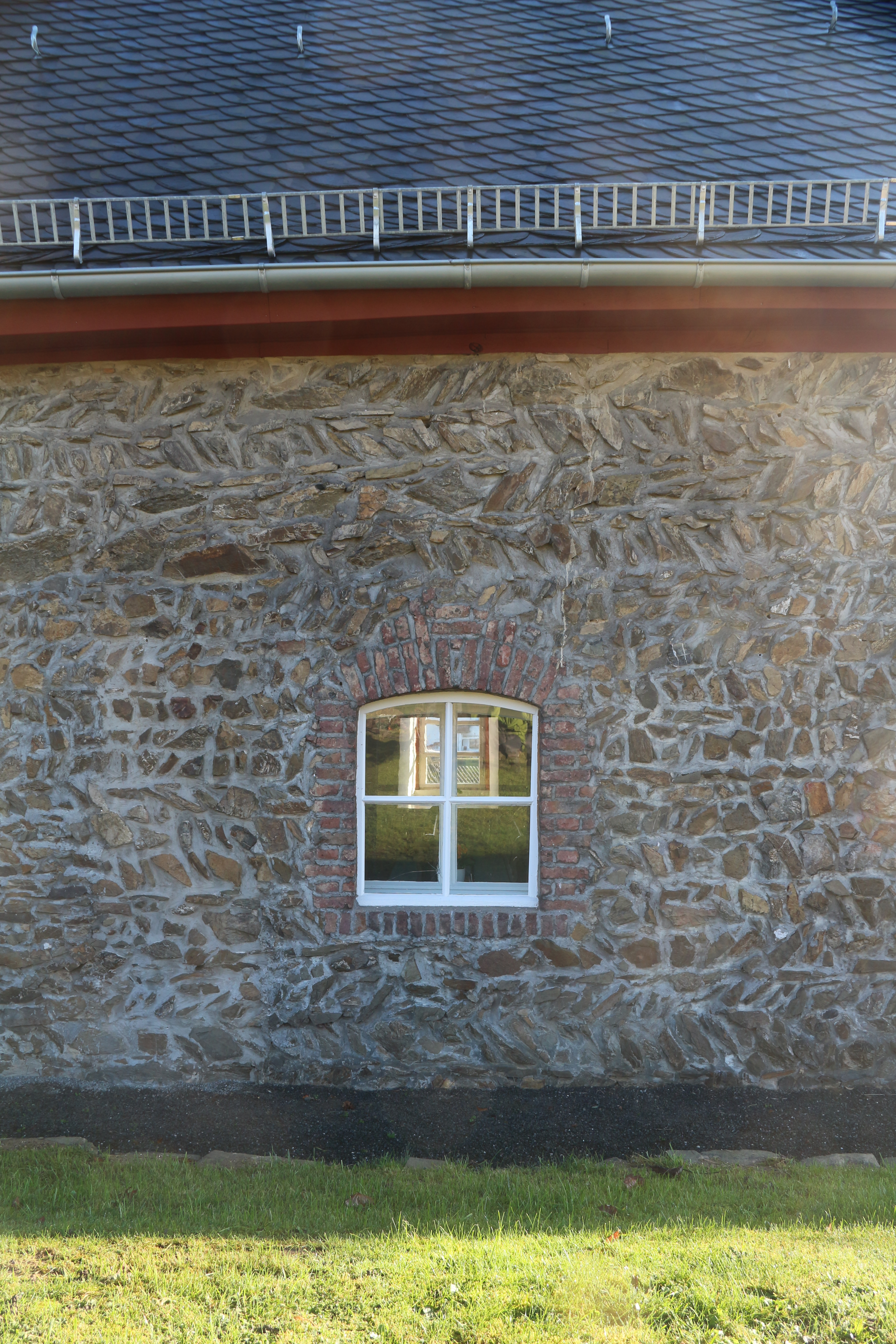 Ev. Kirche Krumbach; Nordwestseite.